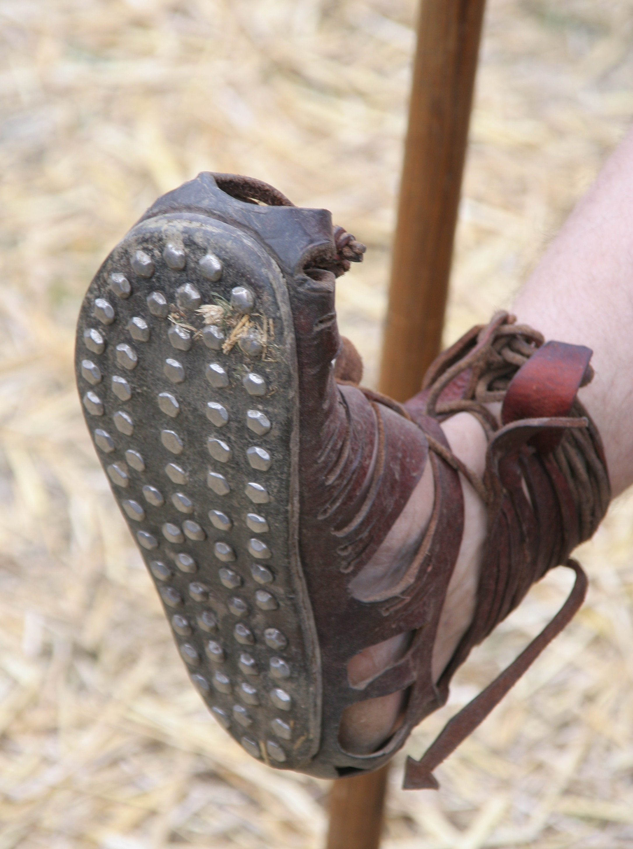 Caligae